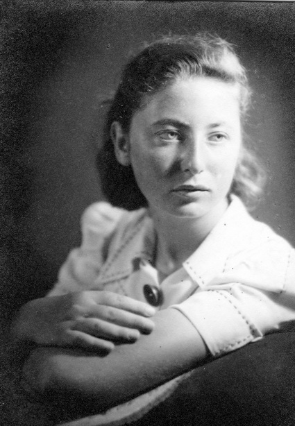 1937 לאחר שסיימתי את הריאלי - תמר אשל